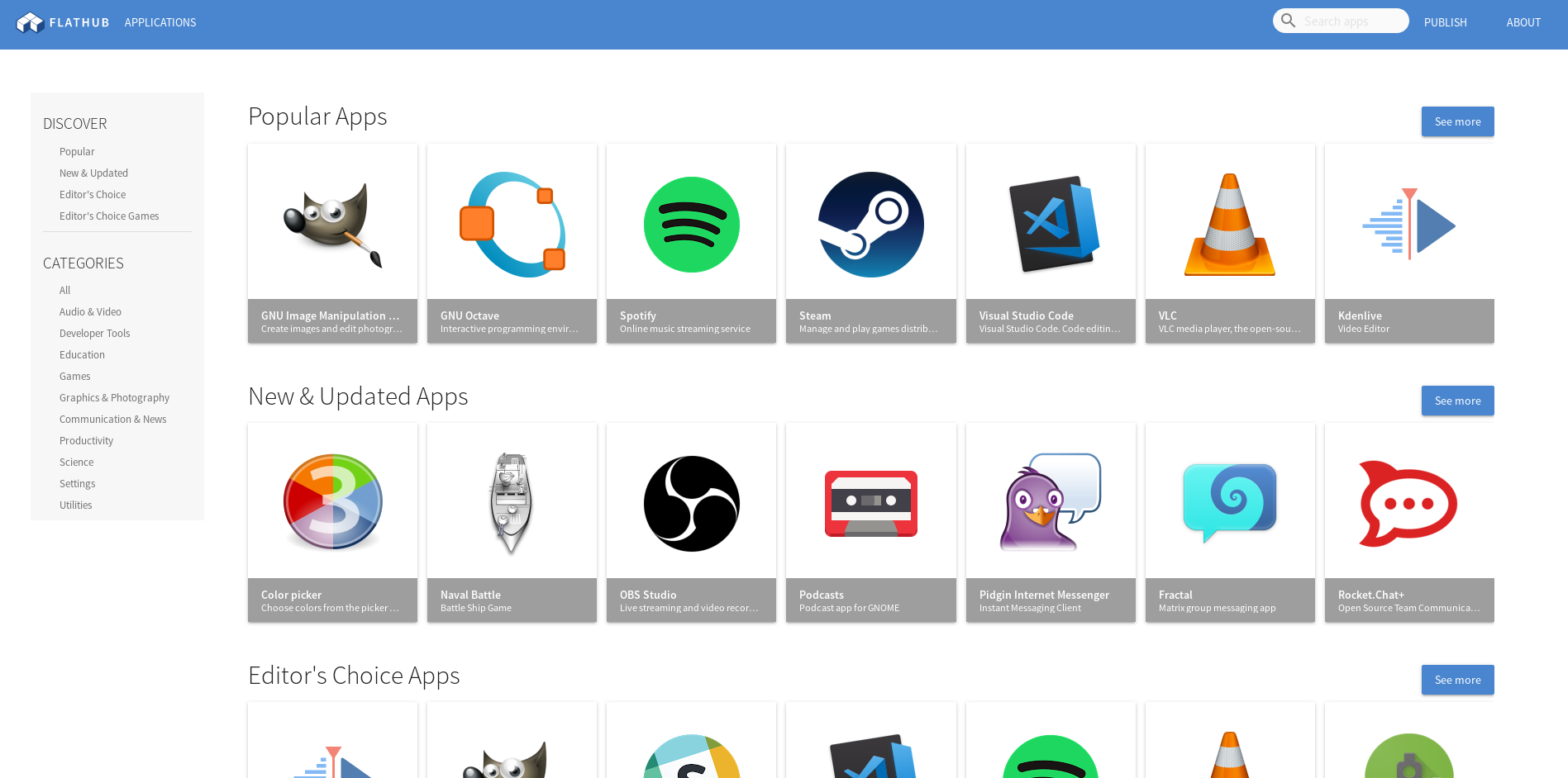 Page d’accueil du magasin d'application Flathub.